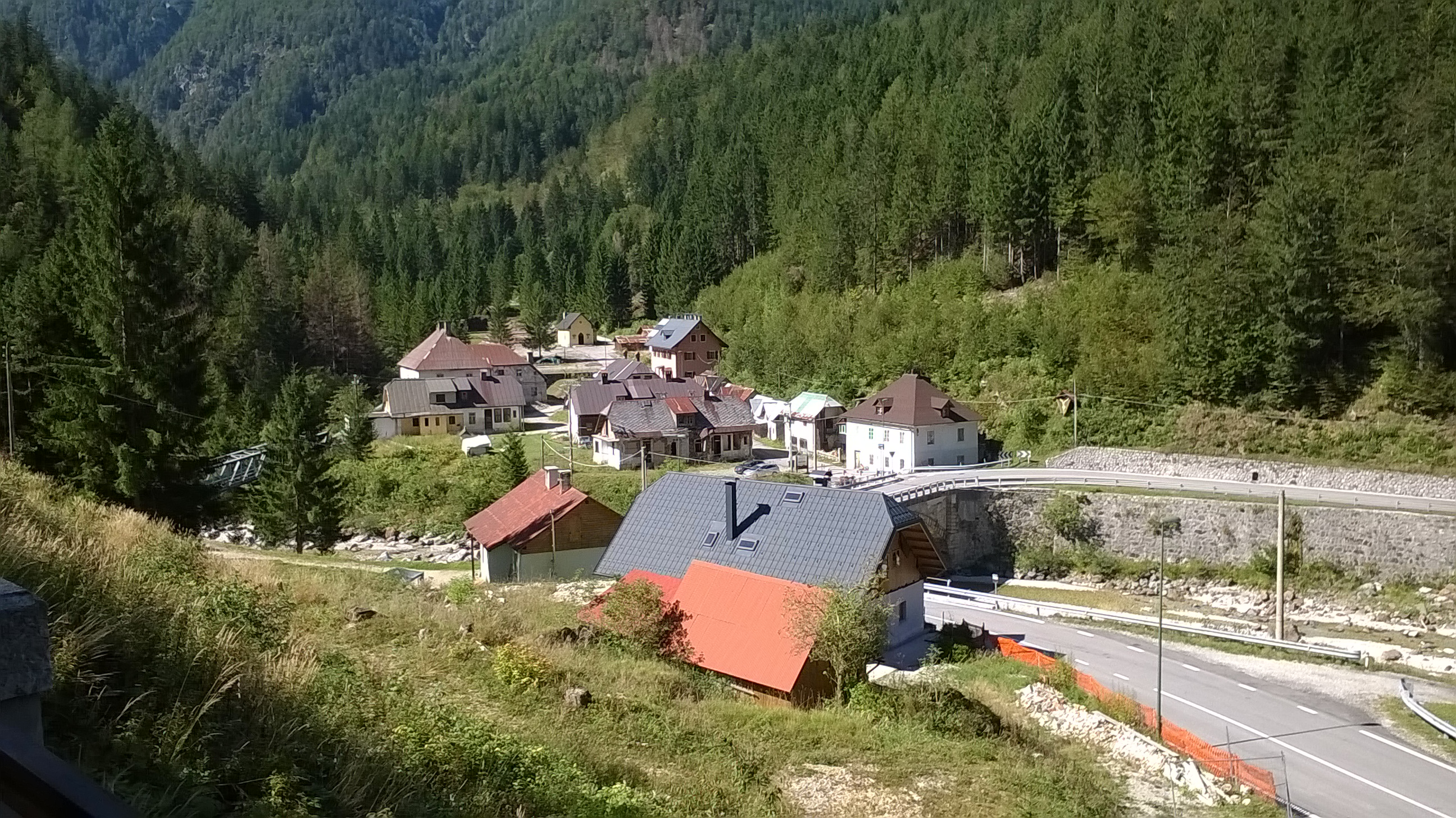 22 set 2016: Tarvisio, fr. Riofreddo